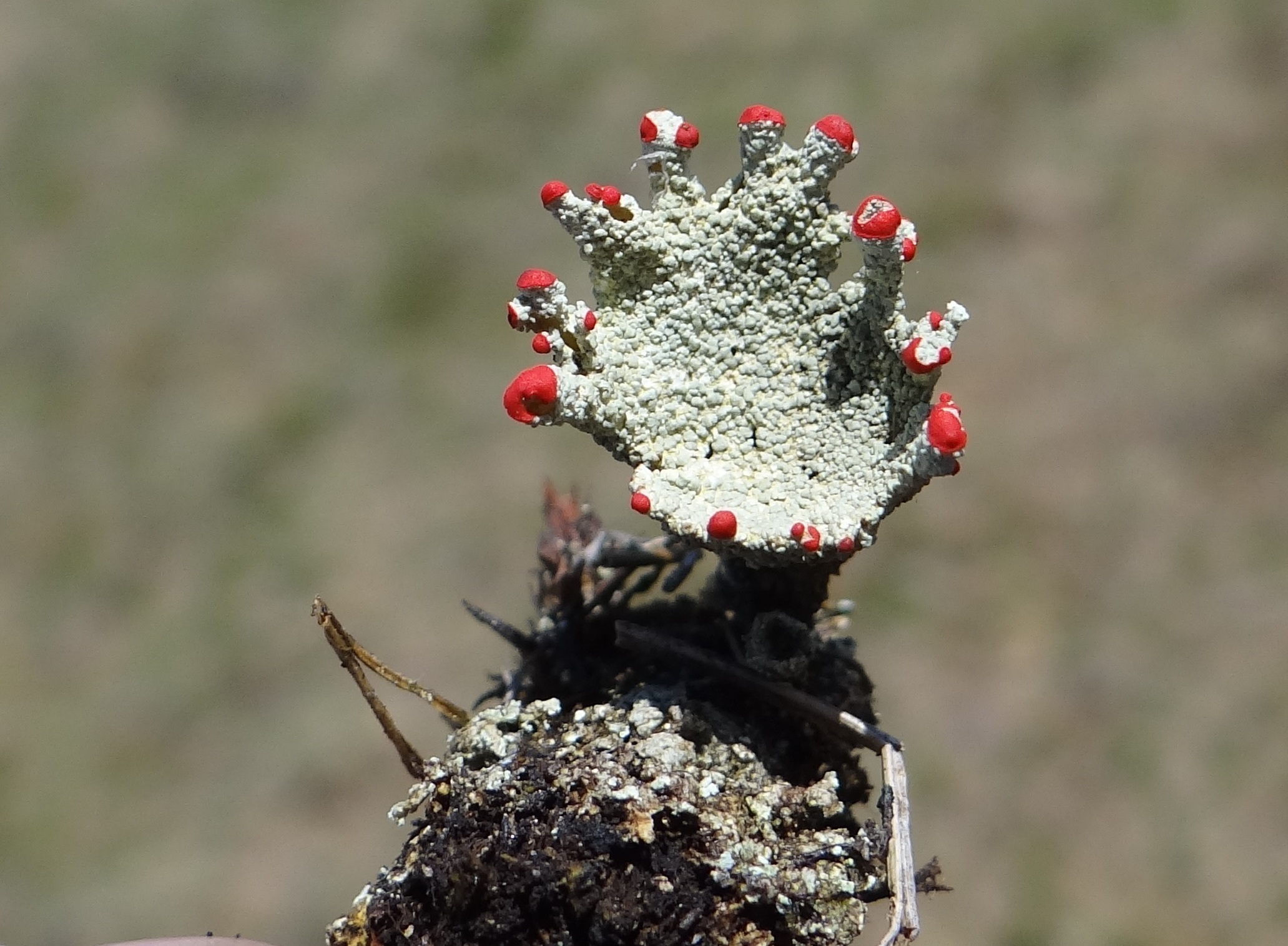 Cladonia pleurota (location: Tatra Mountains, Ciemniak)